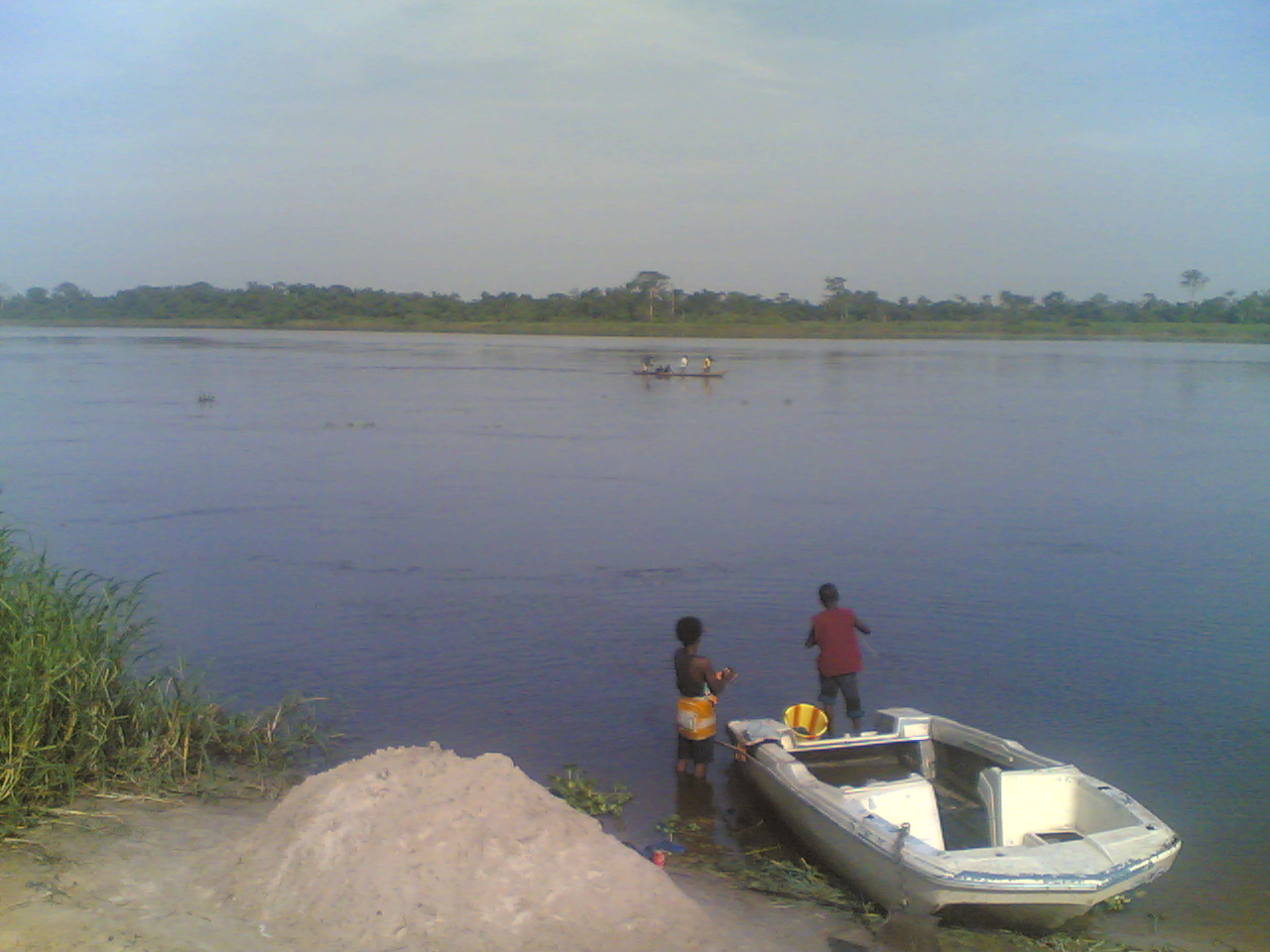 Kwilu River at Bandundu, DRC